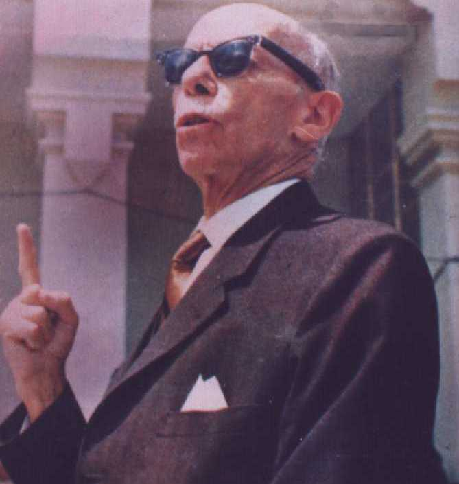 Foto Propiedad del Autor Sevi Velasco